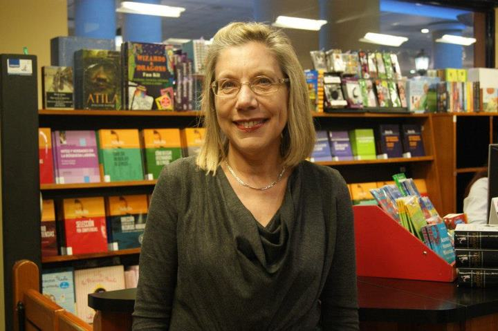 Foto de la Dra. Alles en Ecuador